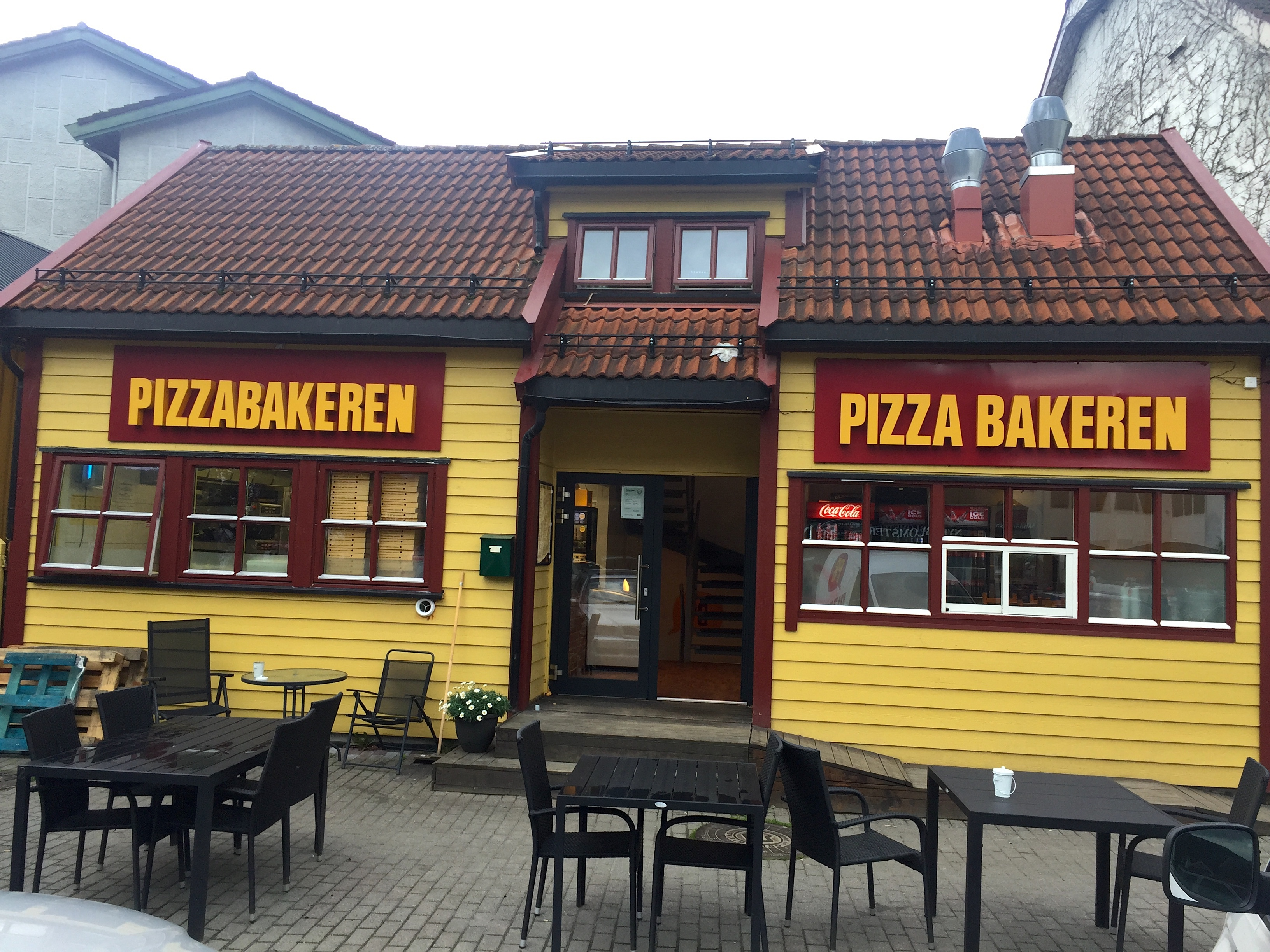 Pizzabakeren-utsalg i Sogndal.